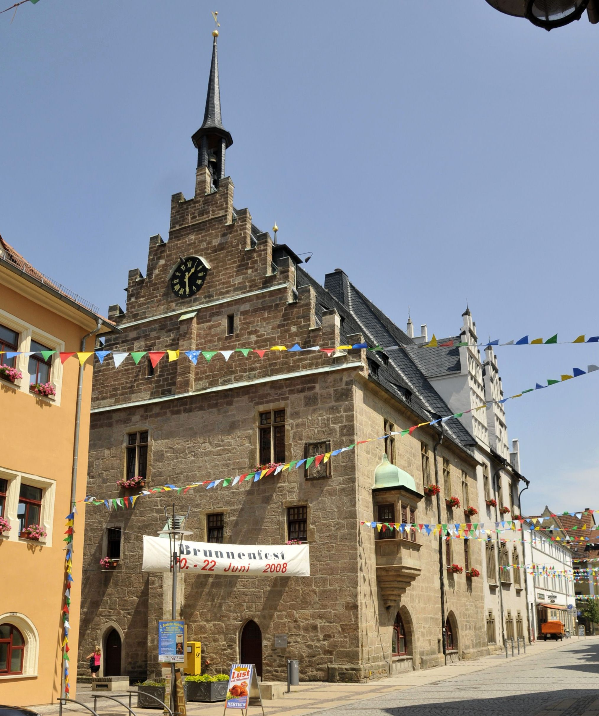 Rathaus von Neustadt an der Orla, Südwestseite